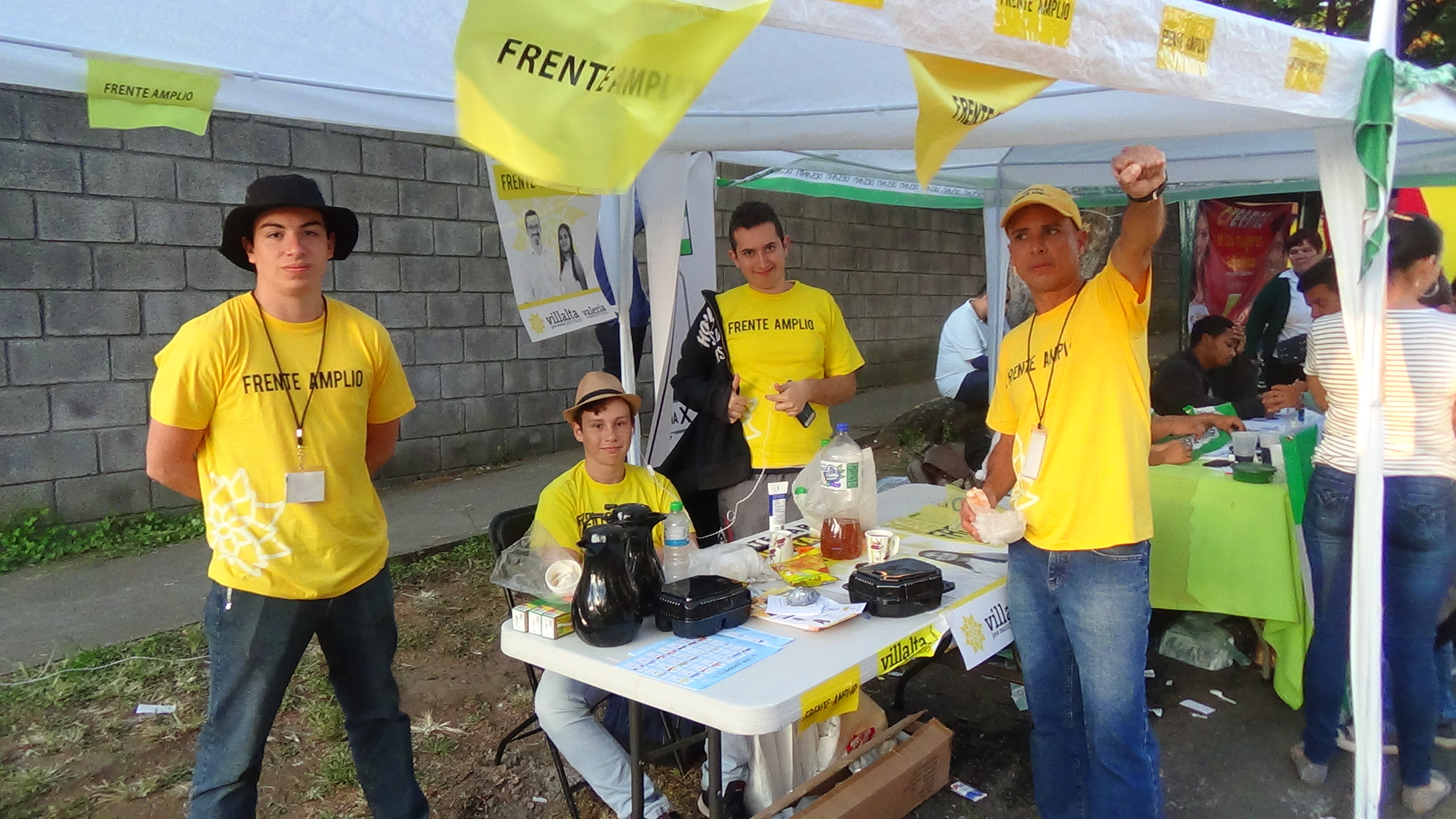 Stand del Frente Amplio